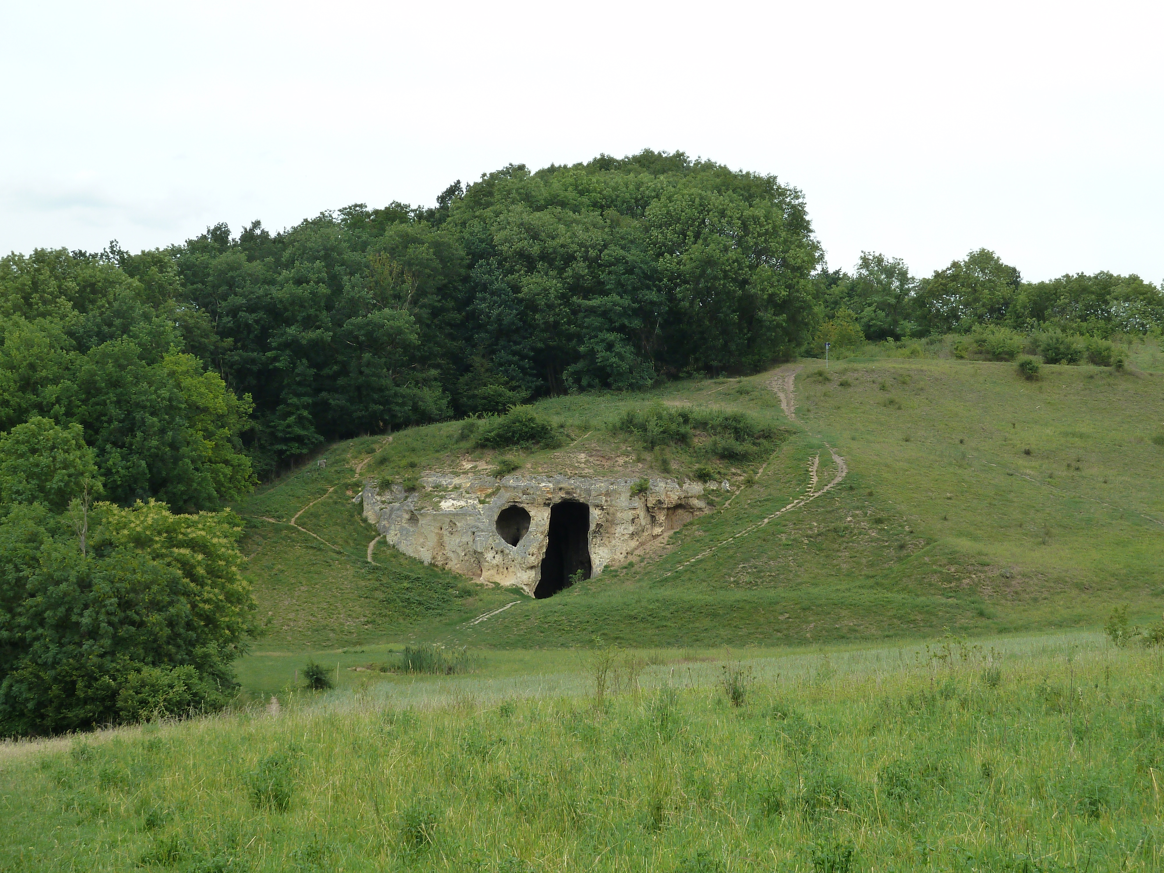 Duivelsgrot, Maastricht, Nederland